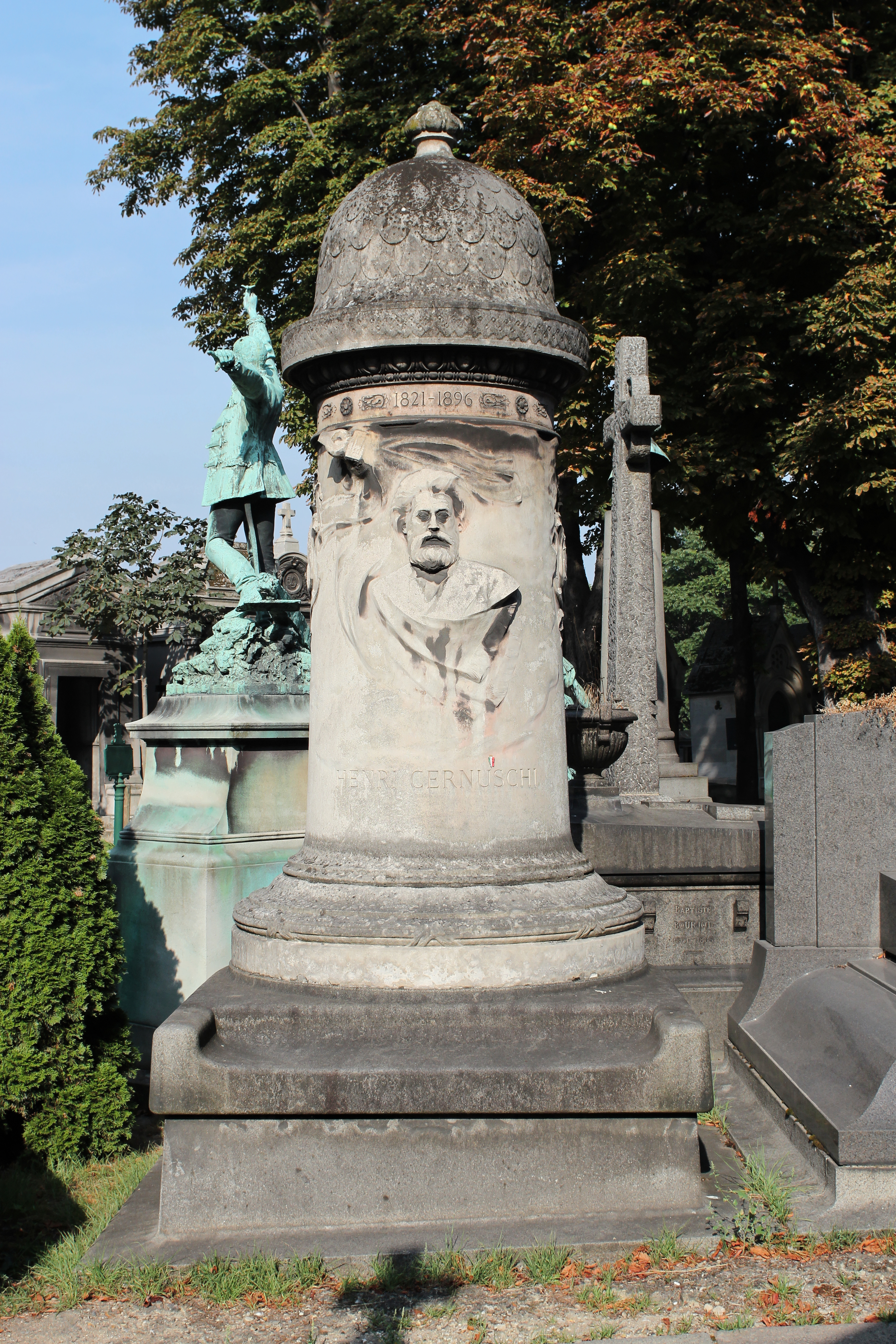 Sépulture d'Henri Cernuschi (1821-1896), banquier, économiste, journaliste et collectionneur d'art italien, naturalisé français. « Une forte stèle, de forme ronde, en marbre blanc, surmontée d’un dôme, est décorée d’un médaillon de l’amateur ayant pour fond un drapeau dont les plis sont fouillés dans la stèle. Signé : Antonin Cariés, 1897. Les armoiries de Rome, Milan et Paris complètent la décoration du monument. » (Jouin, 1897)